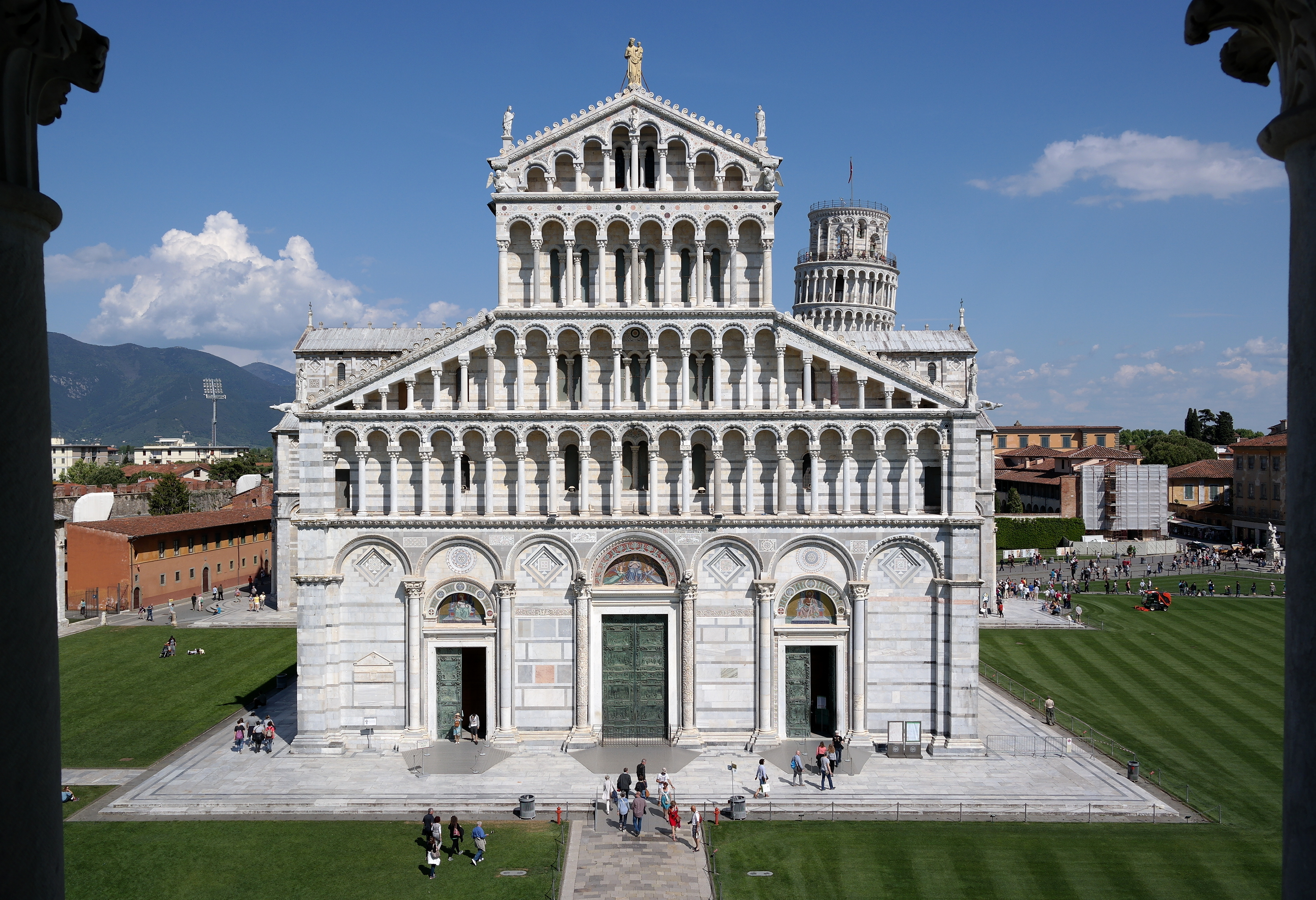 Cattedrale di Pisa vista dal Battistero